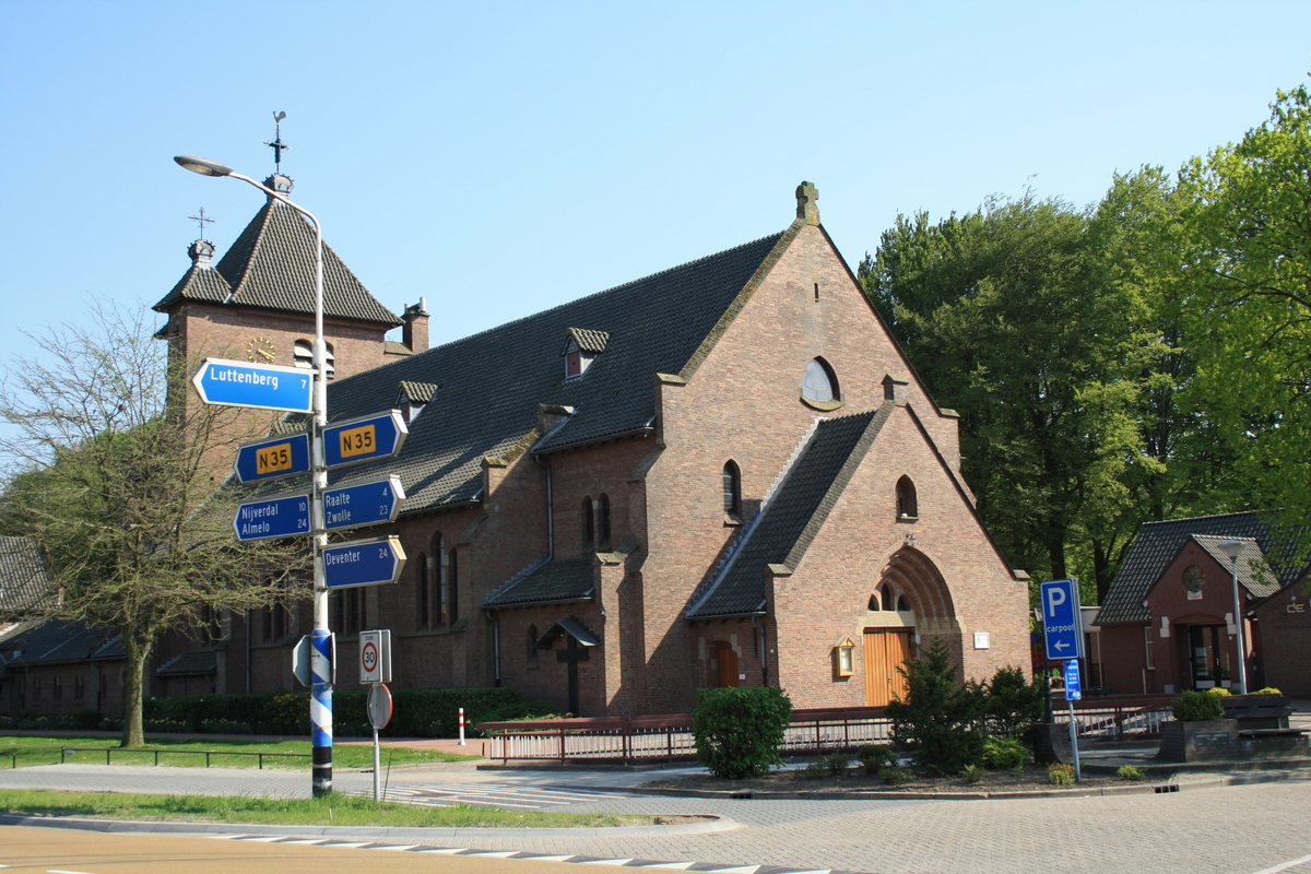 Mariënheem - RK kerk